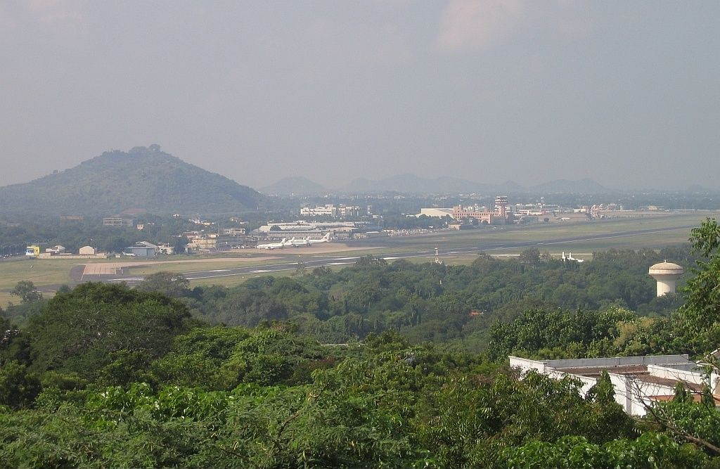 Flughafen Chennai - Blick vom St. Thomas Mount